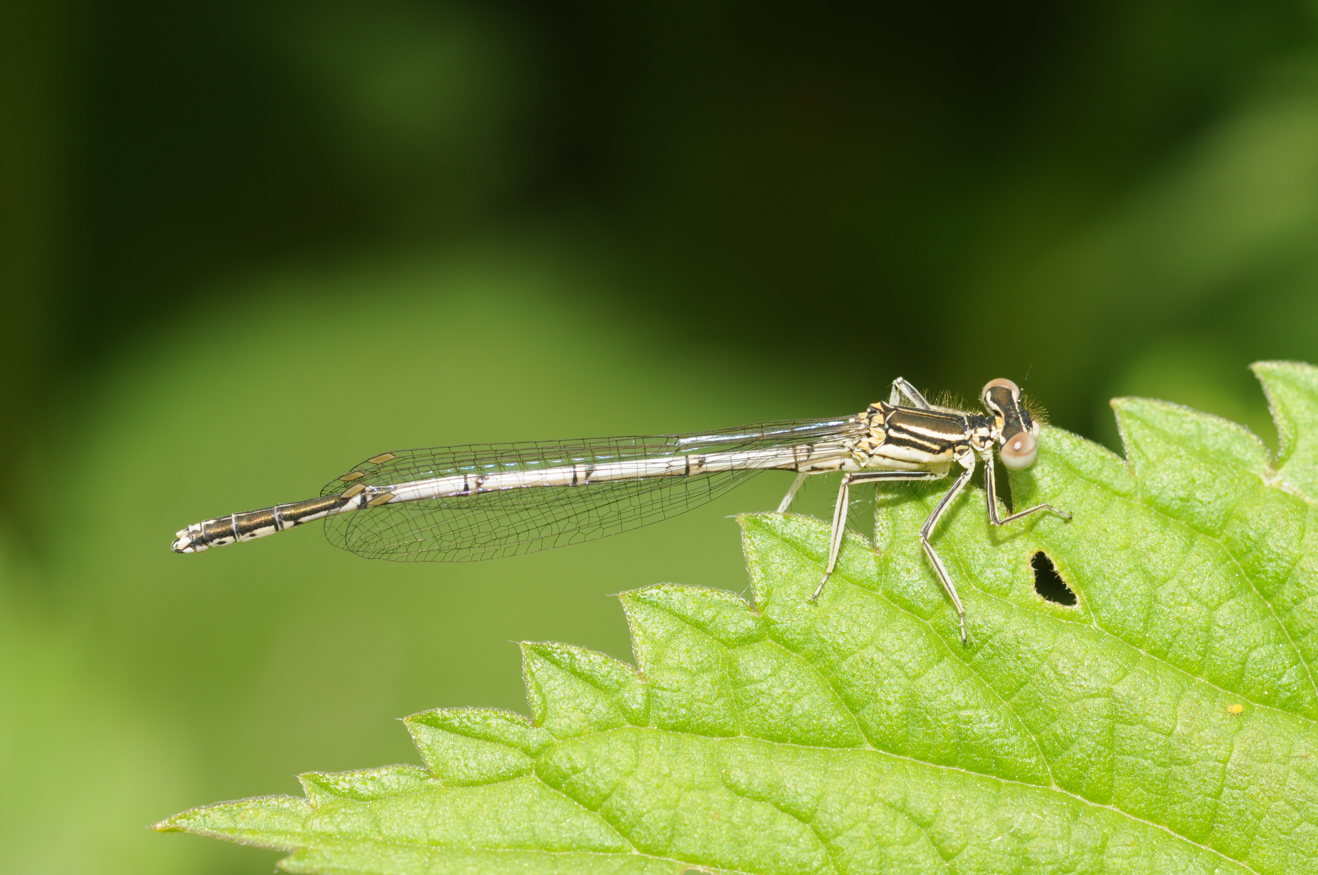 Agrion à larges pattes.